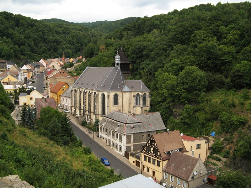 Kostel Nanebevzetí Panny Marie s farou čp. 93 (Krupka), Husitská, Krupka